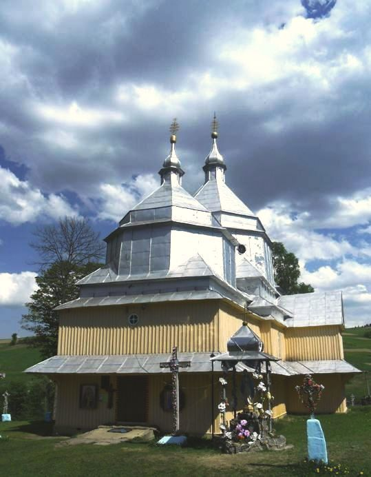 _Церква_св.Івана_Хрестителя.: с.Хащованя Сколівського р-ну.